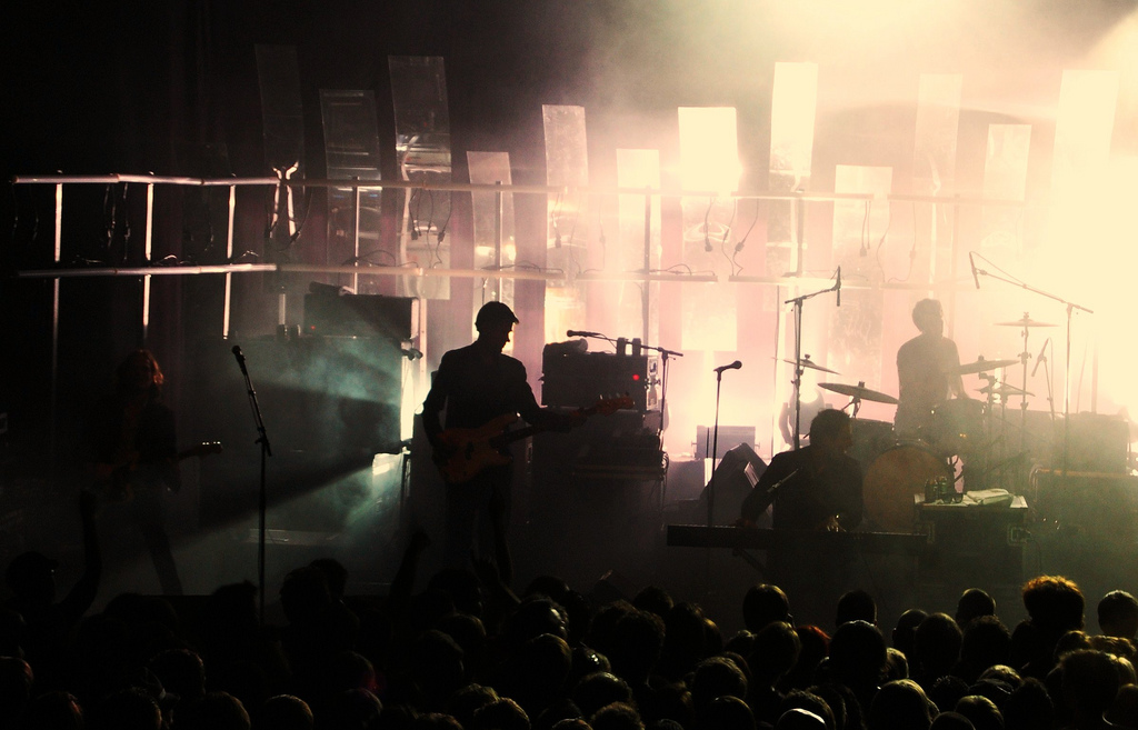 Ghinzu live in Strasbourg